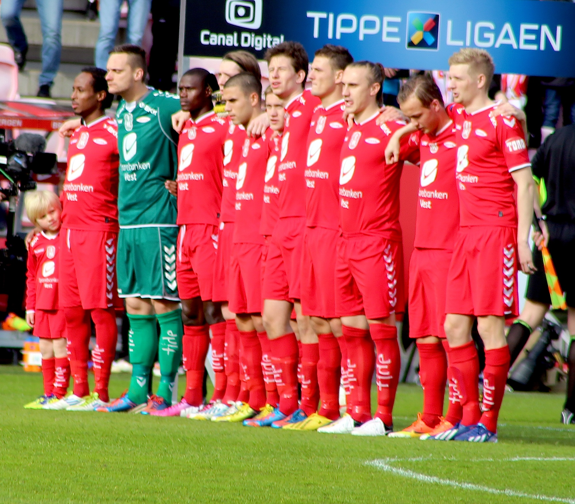 Sportsklubben Brann 16.05.2013